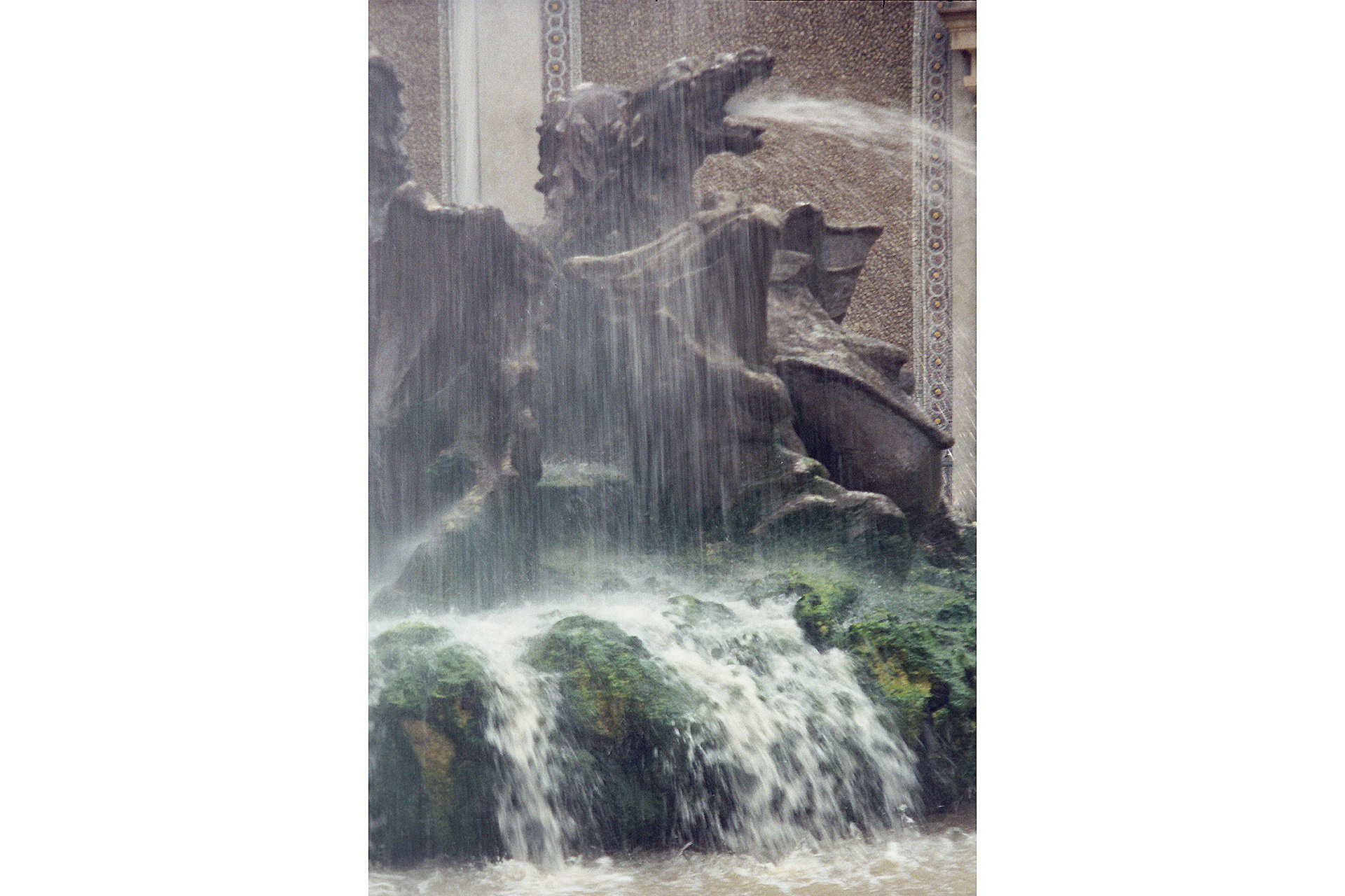 Villa d'Este, Tivoli